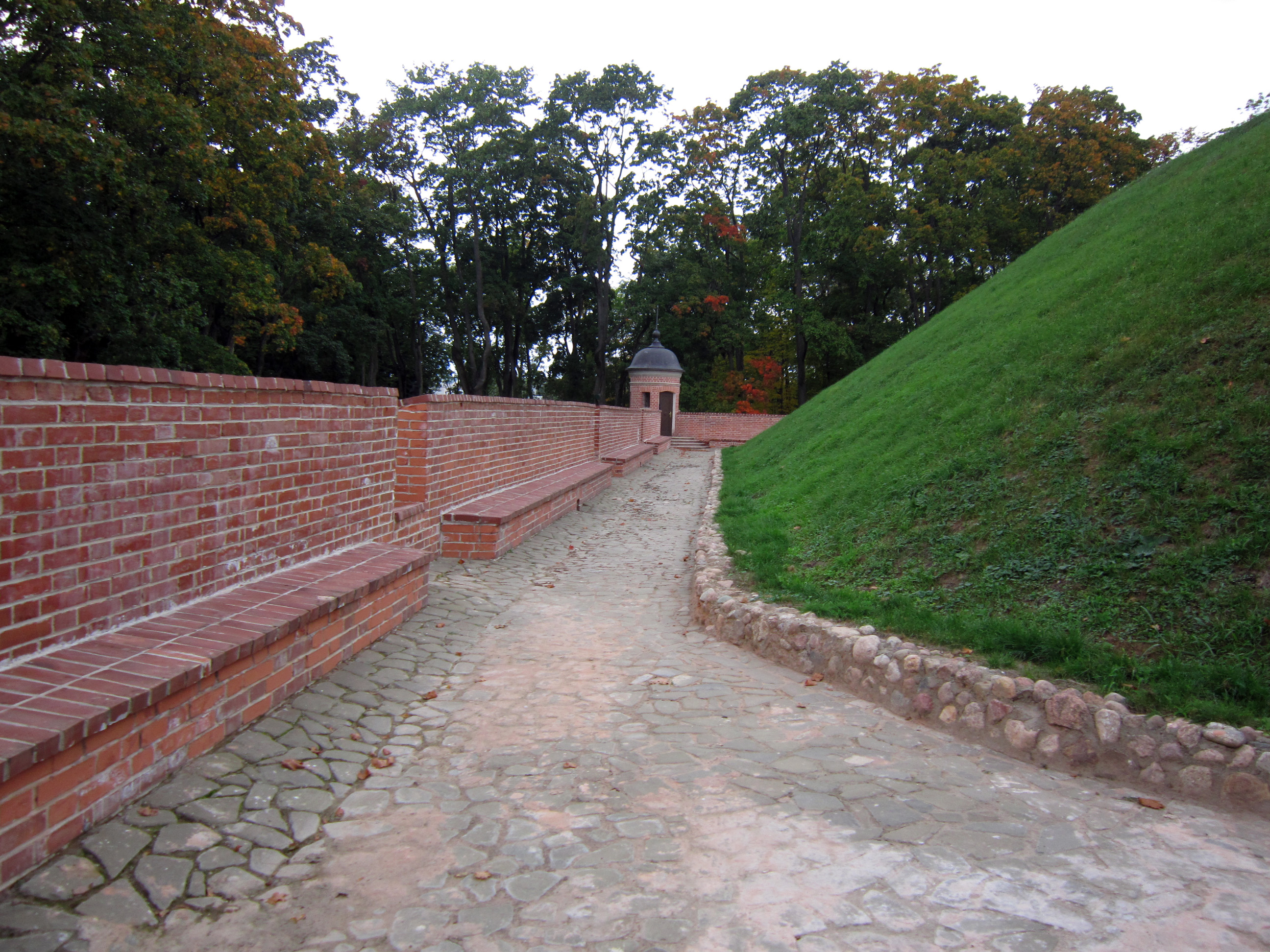 Несвижский замок. Кирпичный бастион.